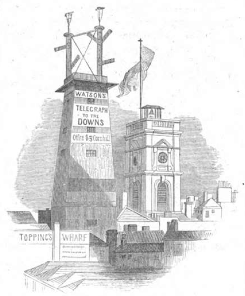 Watson’s Telegraph vor dem Brande